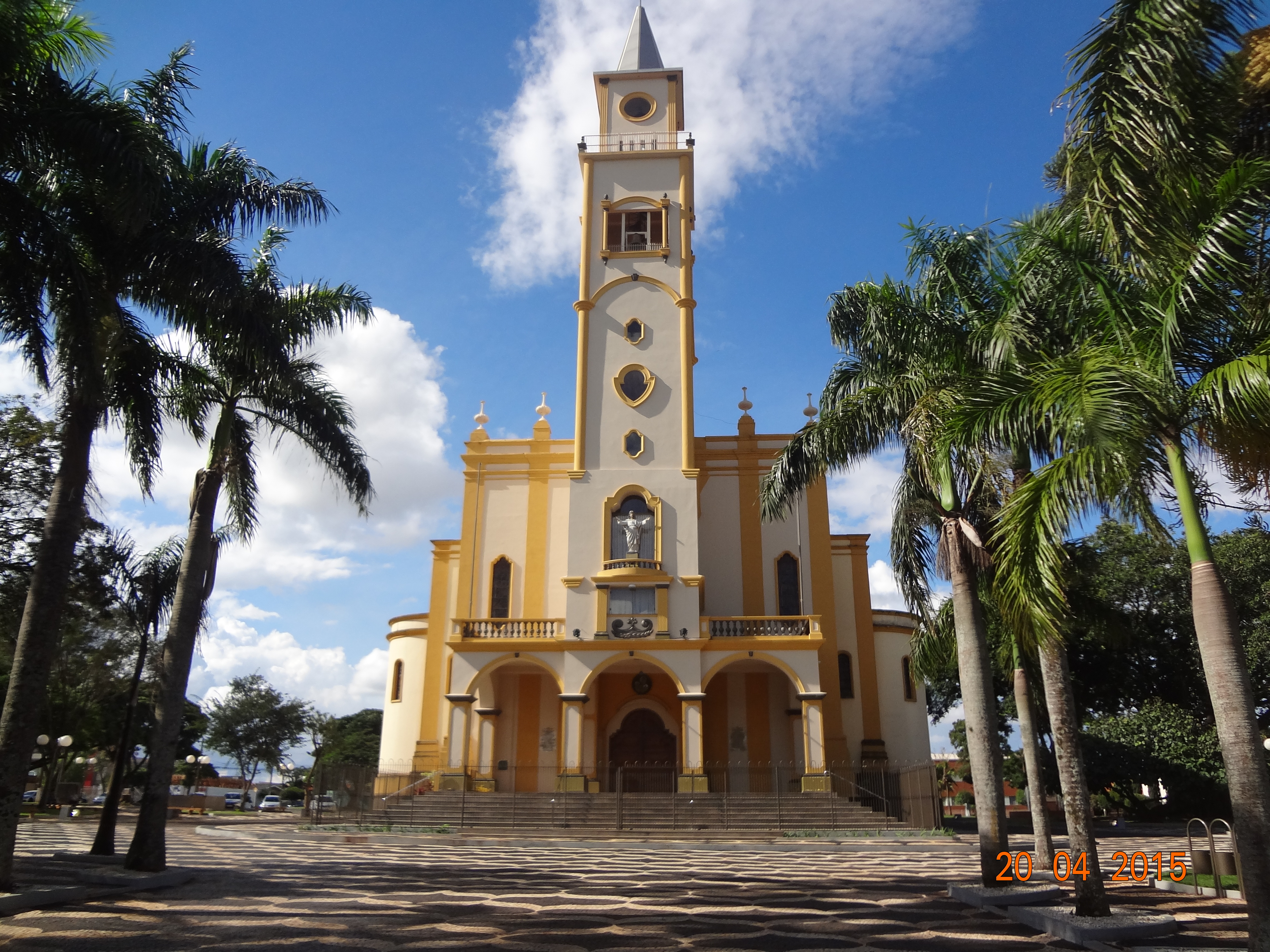 Centro, Rolândia - PR, Brazil